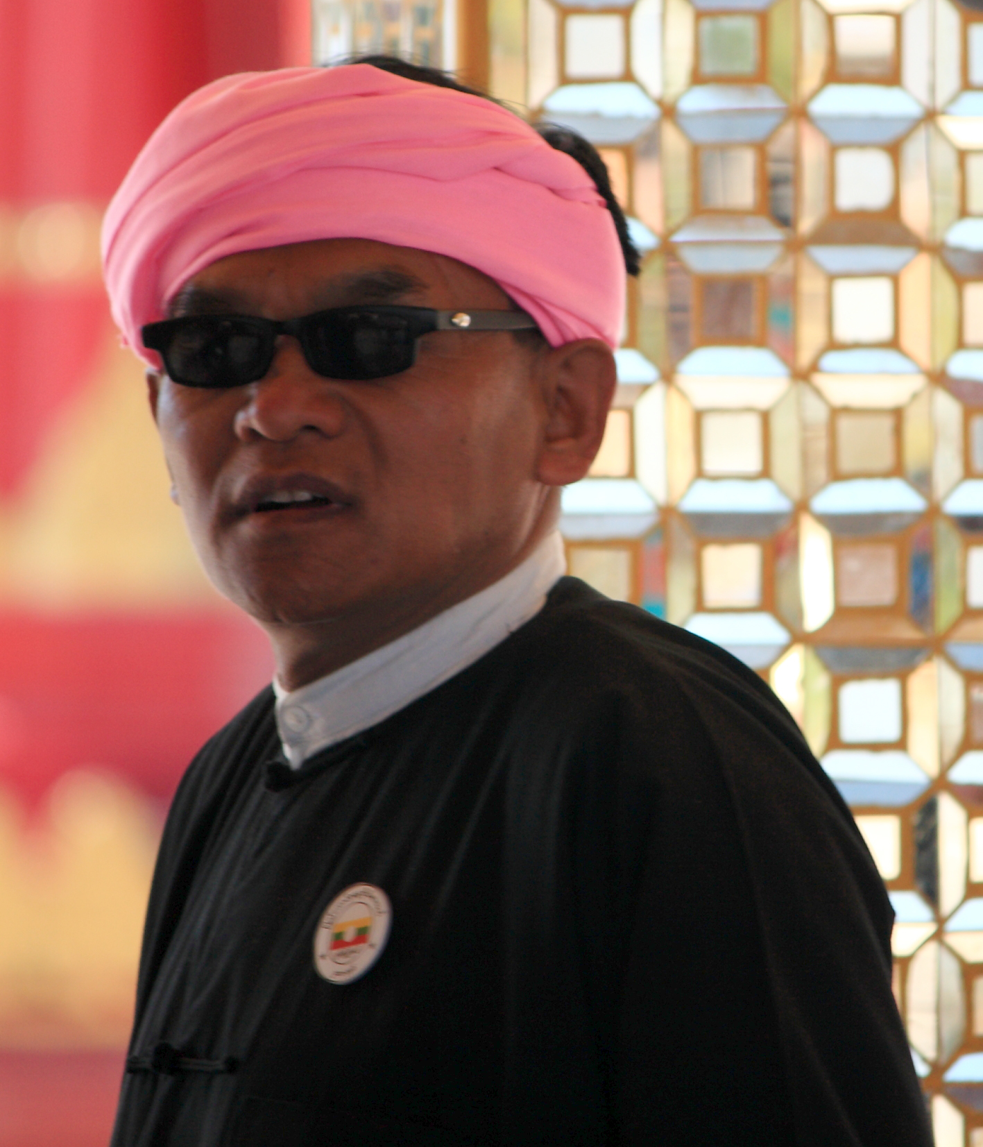 Shan man in Myanmar wearing a gaung baung (turban)